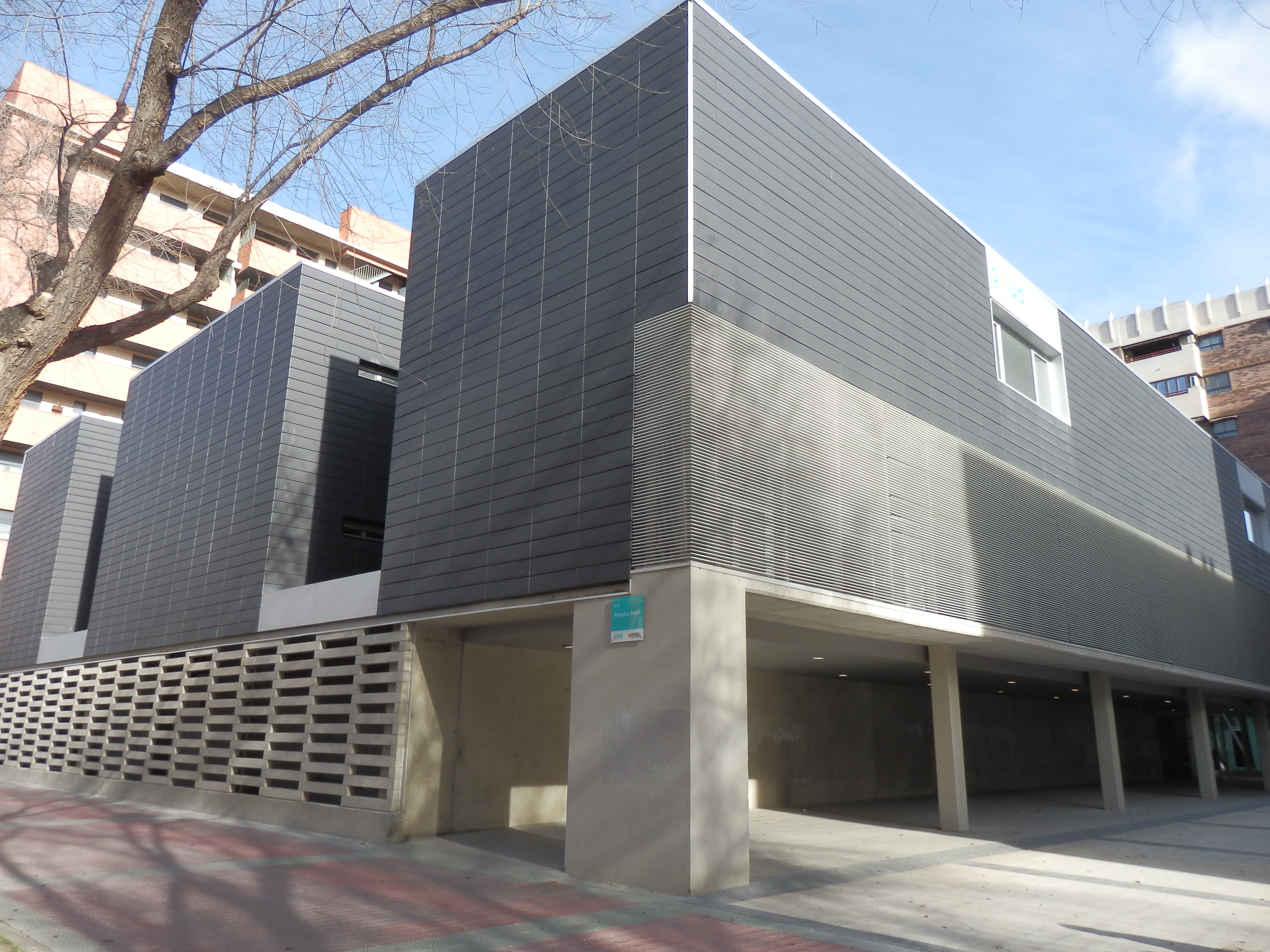 Centro de Salud Amparo Poch en la calle Emilia Pardo Bazán de Zaragoza.